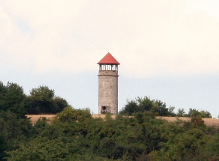 Sulbergwarte